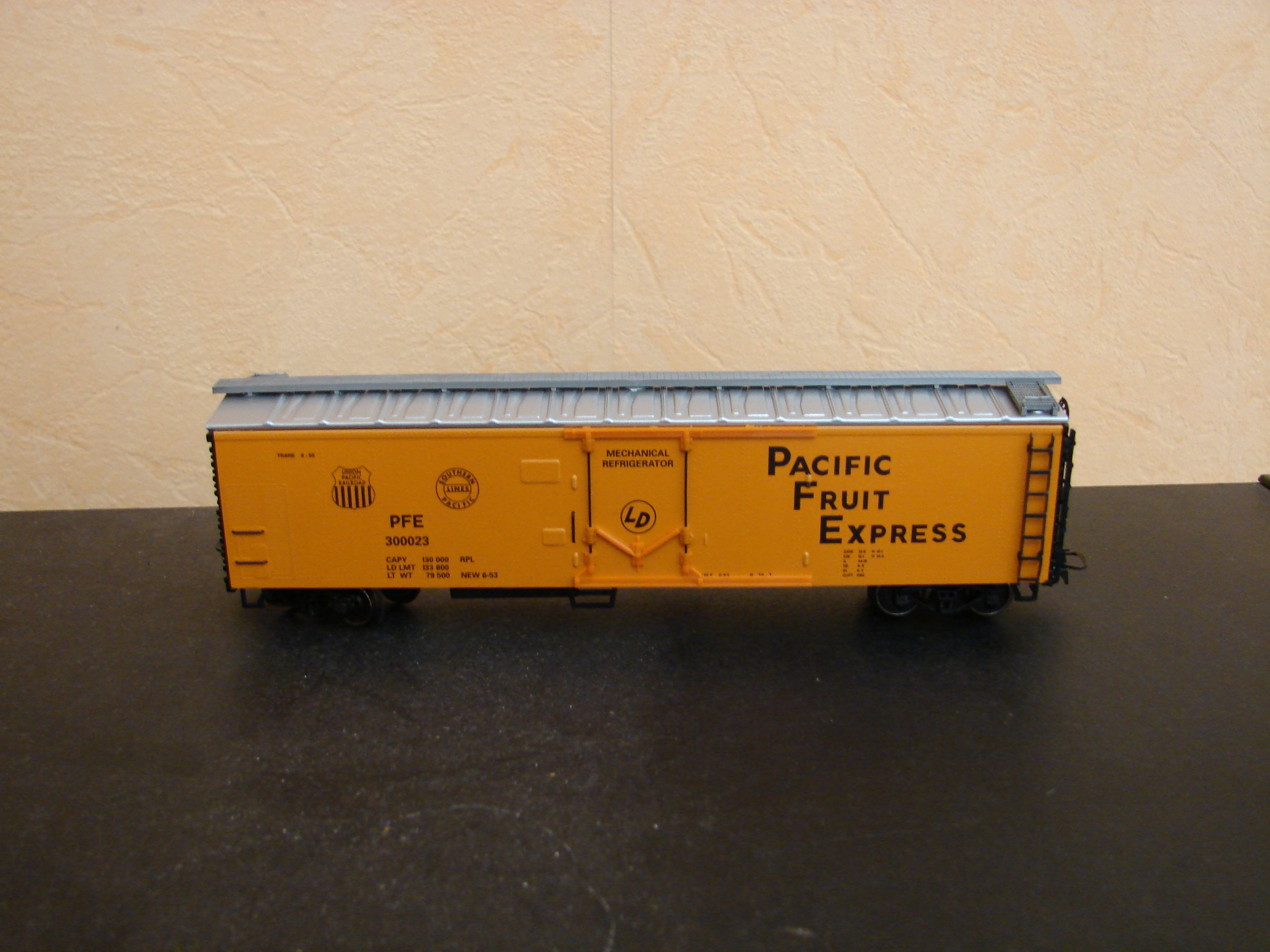 Wagon frigorifique mécanique de la Pacific Fruits Express - Modèle Märklin 47780.